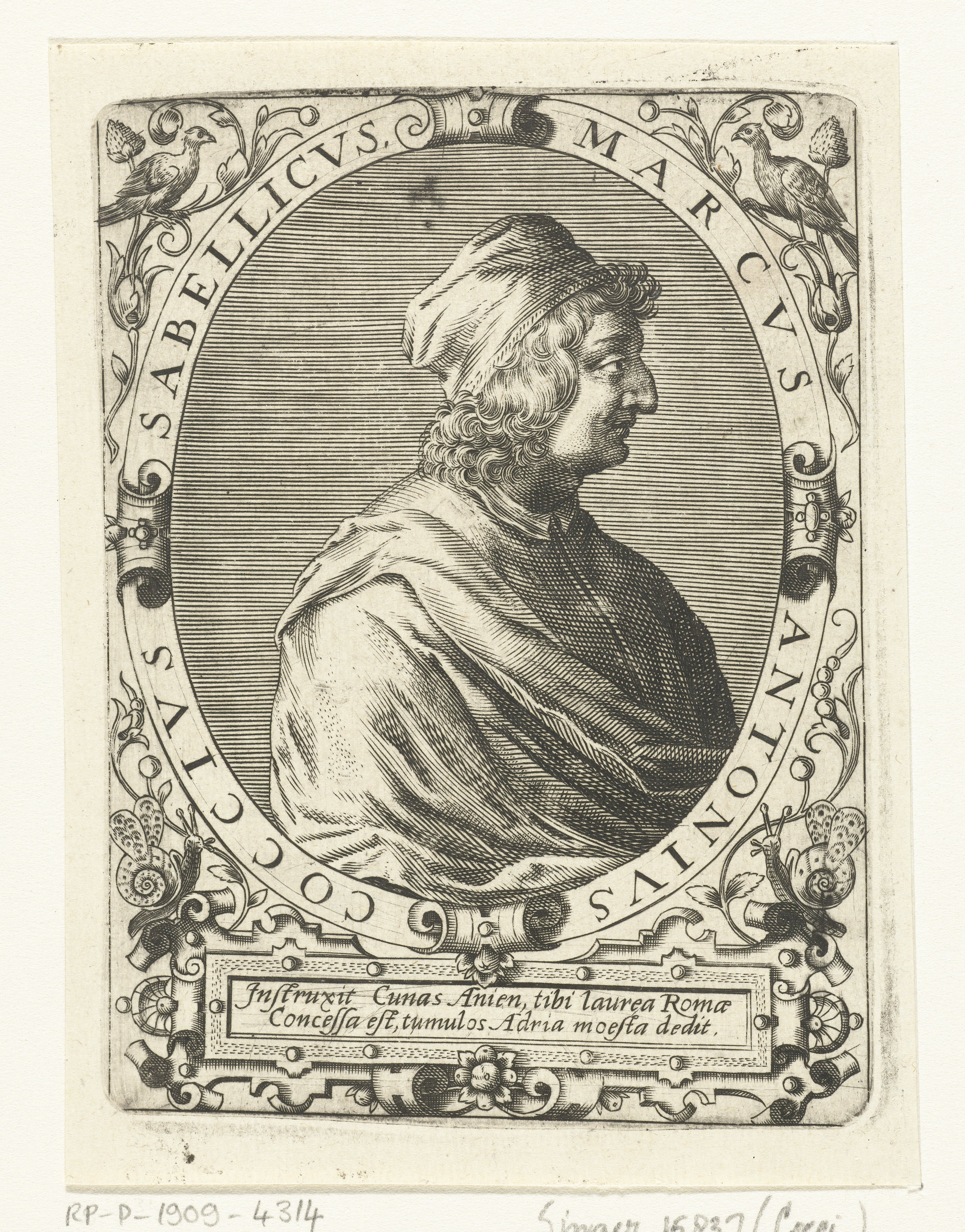 IdentificatieTitel(s): Portret van Marcus Antonius SabellicusMarcus Antonius Coccius Sabellicus (titel op object)Objecttype: prent boekillustratie Objectnummer: RP-P-1909-4314Catalogusreferentie: Singer 15837Opschriften / Merken: verzamelaarsmerk, verso, gestempeld: Lugt 2228Omschrijving: Portret van de Venetiaanse historicus Marcus Antonius Sabellicus, in ovaal met randschrift. Onder het portret een cartouche met een Latijns vers.VervaardigingVervaardiger: prentmaker: Theodor de Bryprentmaker: Johann Theodor de Brynaar ontwerp van: Jean Jacques Boissard (mogelijk)Plaats vervaardiging: Frankfurt am MainDatering: ca. 1597 - ca. 1599Fysieke kenmerken: gravureMateriaal: papier Techniek: graveren (drukprocedé)Afmetingen: plaatrand: h 140 mm × b 100 mmToelichtingGemaakt voor: J.J. Boissard, Icones virorum illustrium doctrina &c eruditione praestanti um contines. Frankfurt am Main: de Bry, 1597-1599.OnderwerpWie: Marcus Antonius Coccius SabellicusVerwerving en rechtenVerwerving: aankoop 1905Copyright: Publiek domein